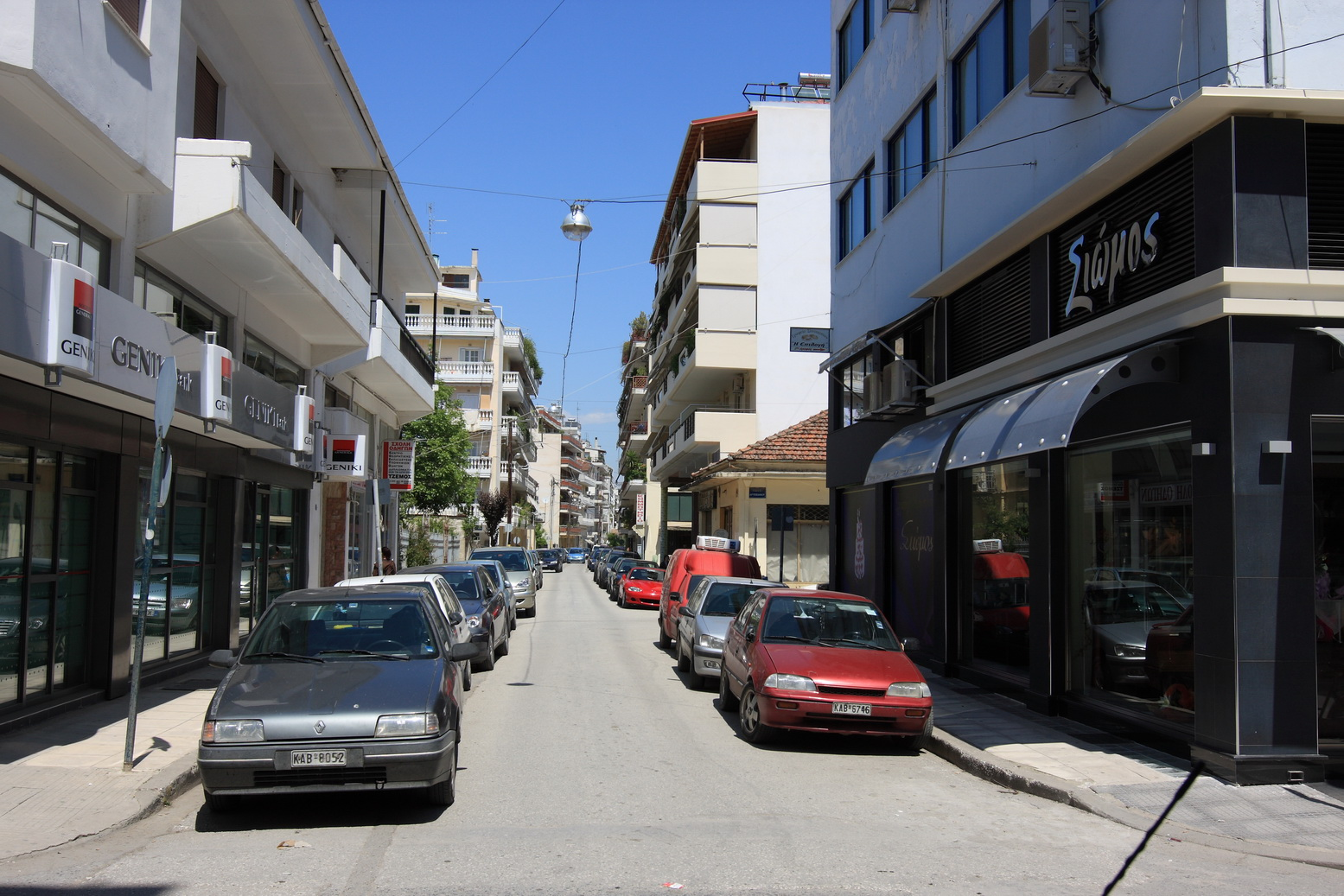 Улицы города Кардица